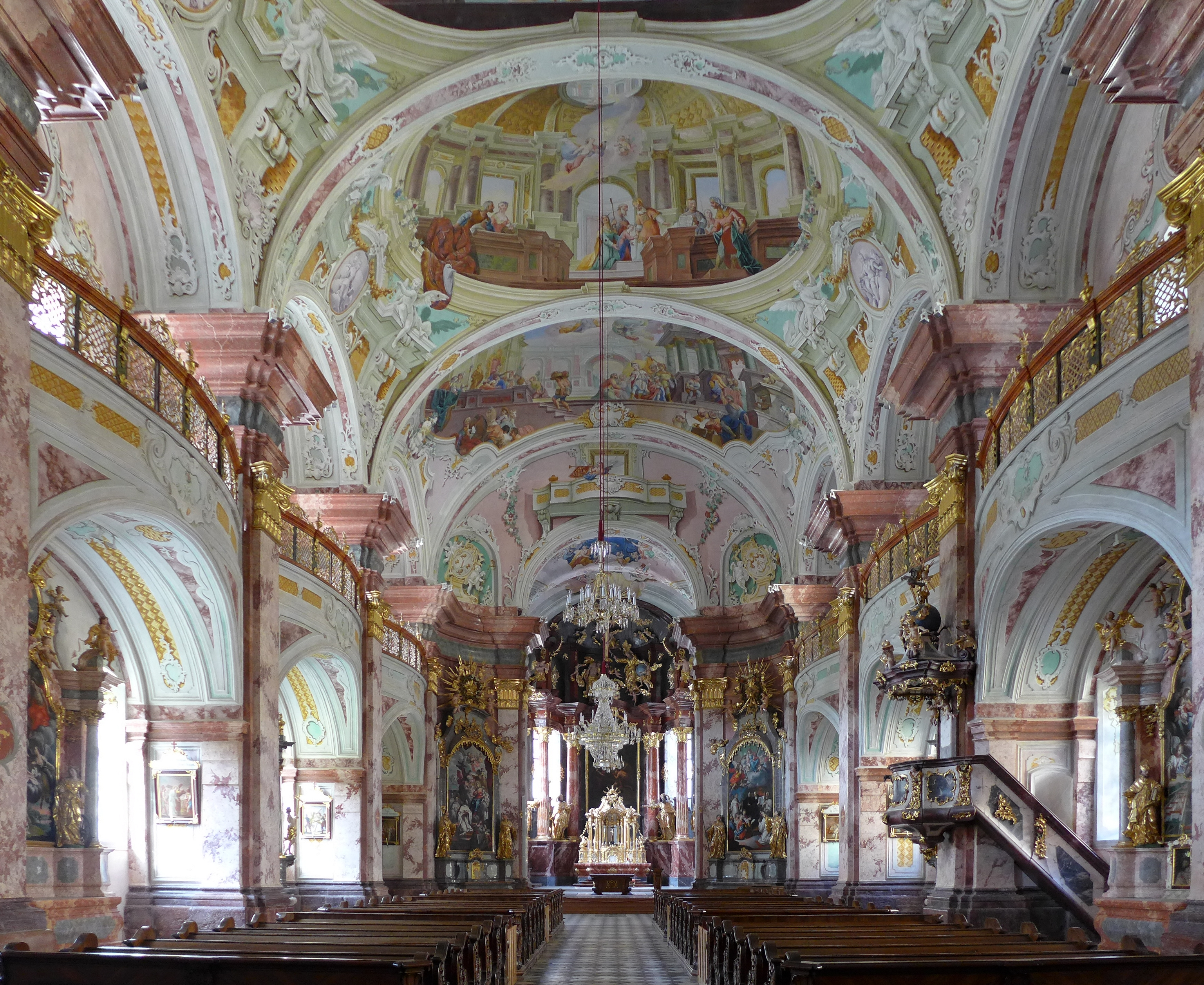 Stiftskirche Rein - Innenraum 1